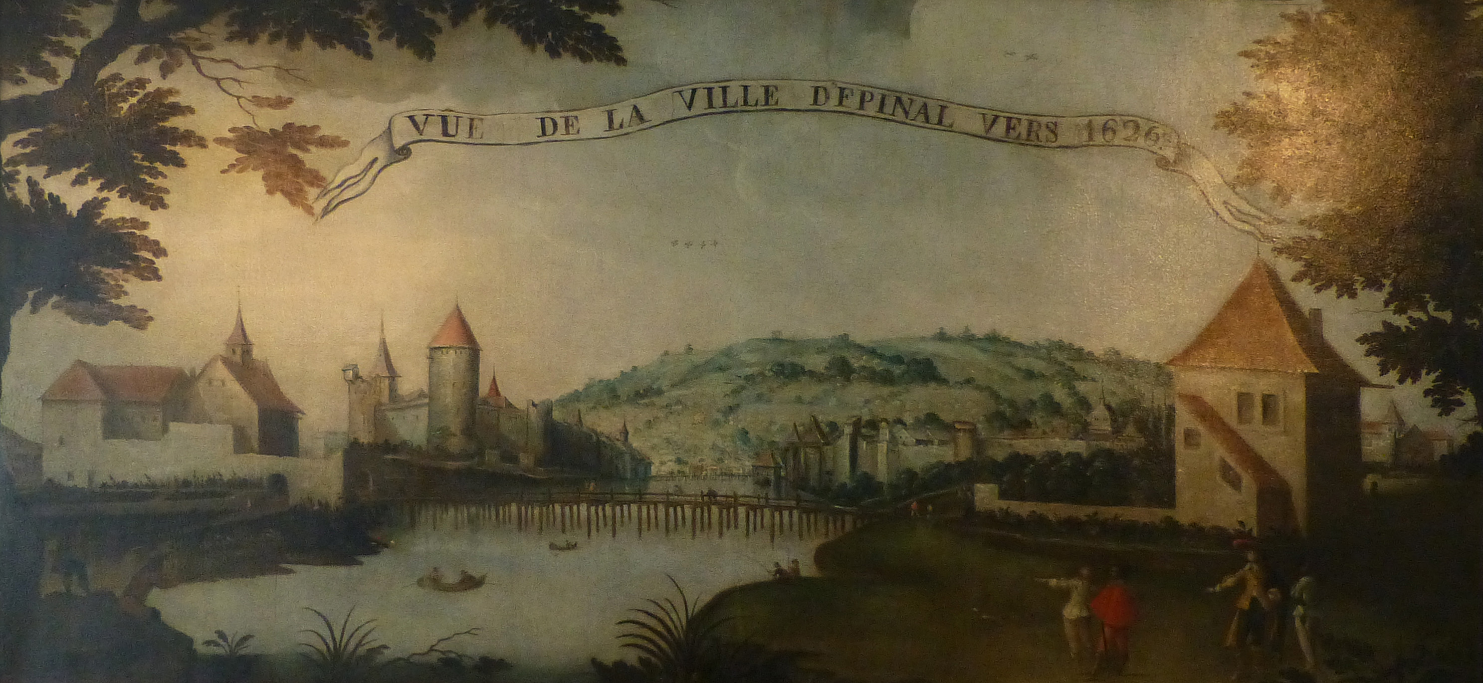 Nicolas Bellot, Vue de la ville d'Epinal vers 1626. Musée départemental d'art ancien et contemporain